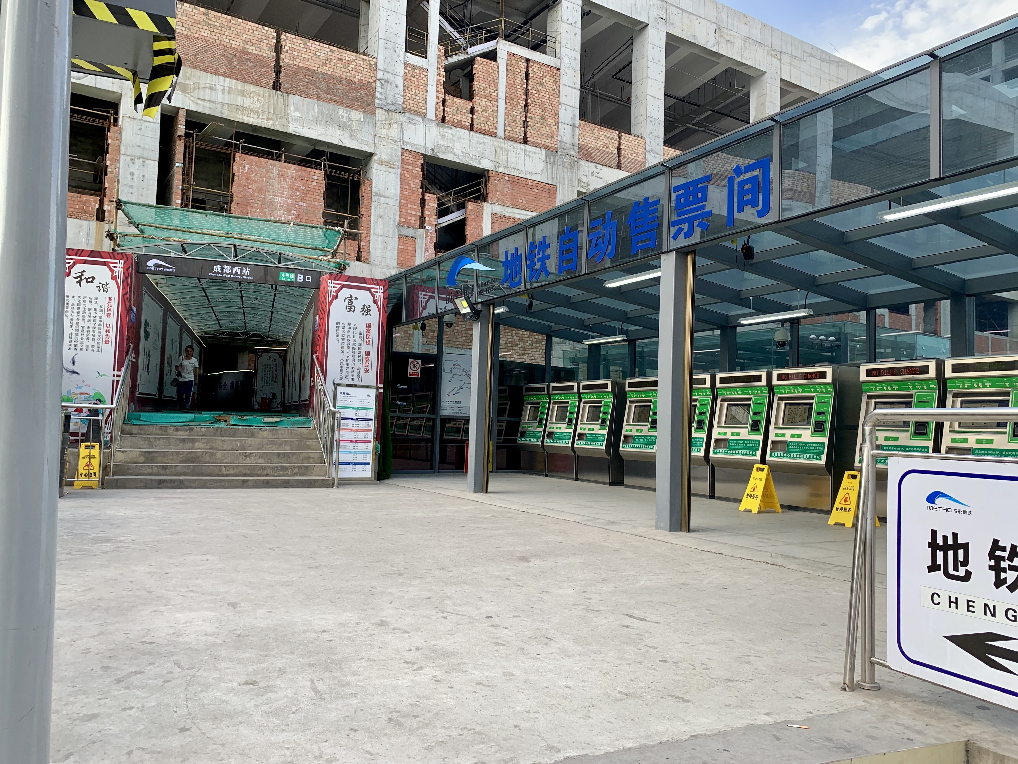 成都西站地铁站因成都有轨电车蓉2号线综合楼施工，临时设置的B出入口